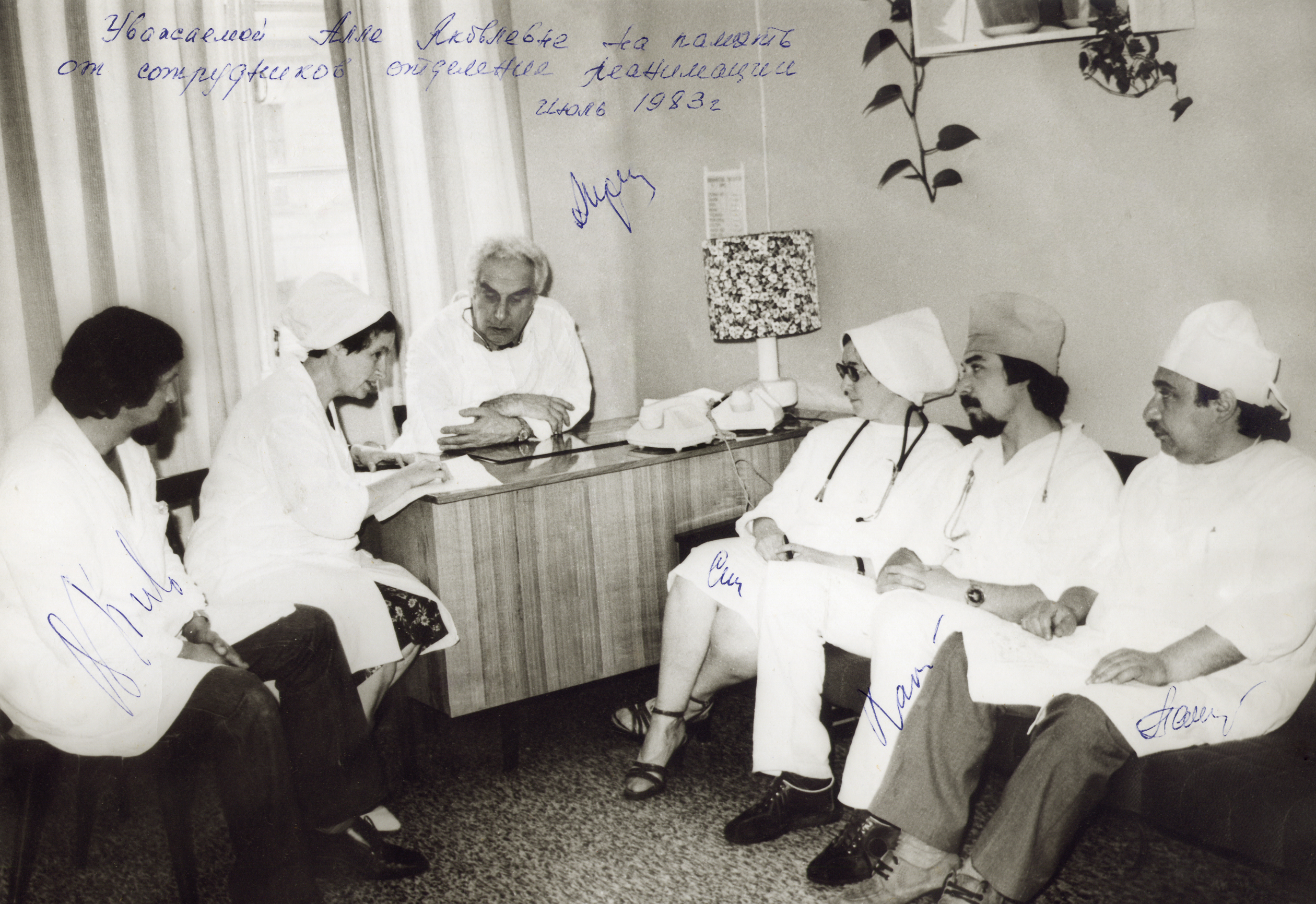 А. Я. Пучкова и зав. отделением реанимации А. В. Ирлин. Детская городская больница № 2. Ленинград, 1983 г.